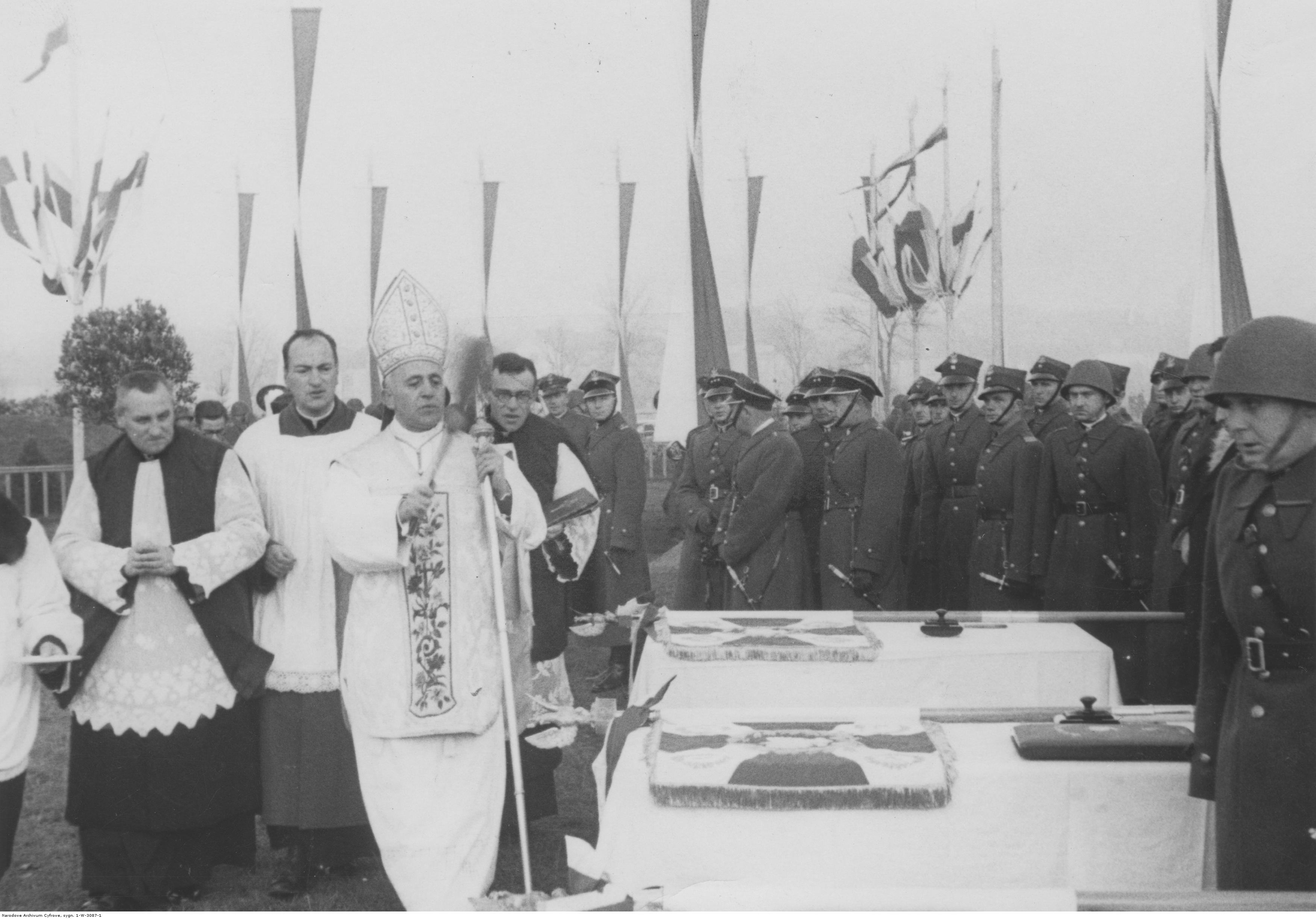 Wręczenie sztandarów jednostkom artylerii przeciwlotniczej; Warszawa, listopad 1938. Biskup polowy Józef Gawlina święci sztandary. Koncern Ilustrowany Kurier Codzienny - Archiwum Ilustracji. Sygnatura: 1-W-3087-1